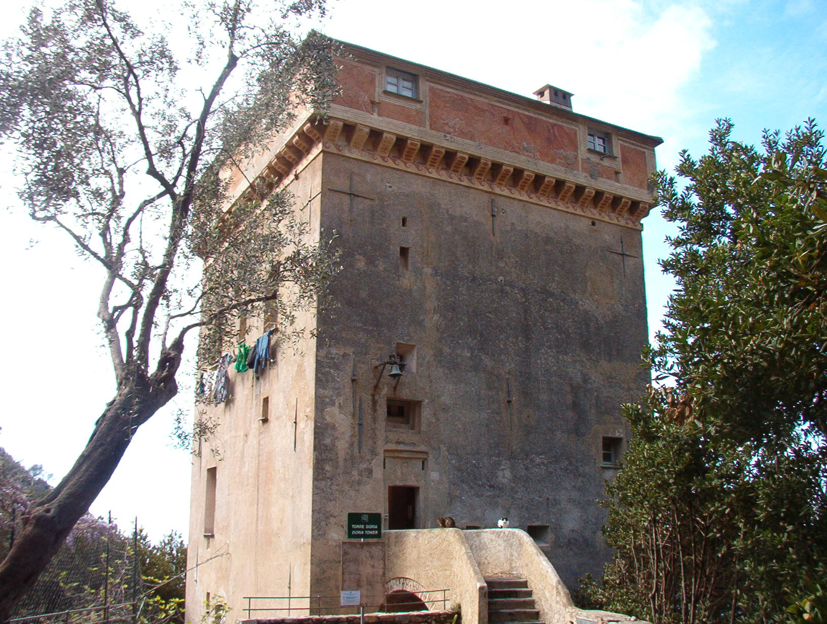 Torre Doria, San Fruttuoso, Camogli, Liguria, Italia